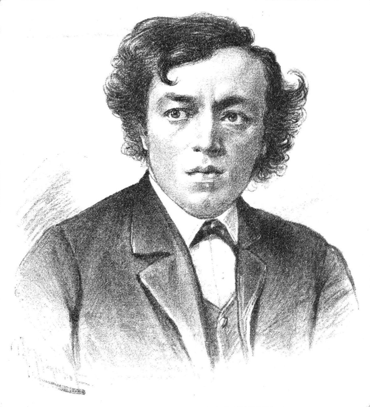 Georg Schumann (Komponist), 1890